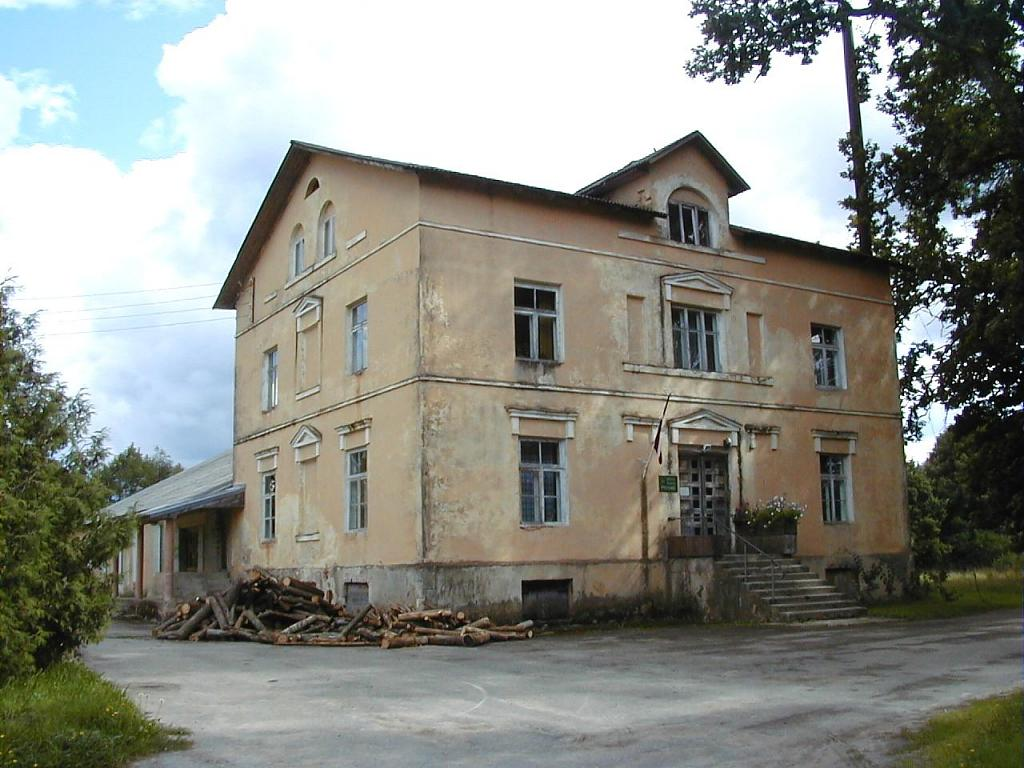 Liezeres muiža 2001-08-25